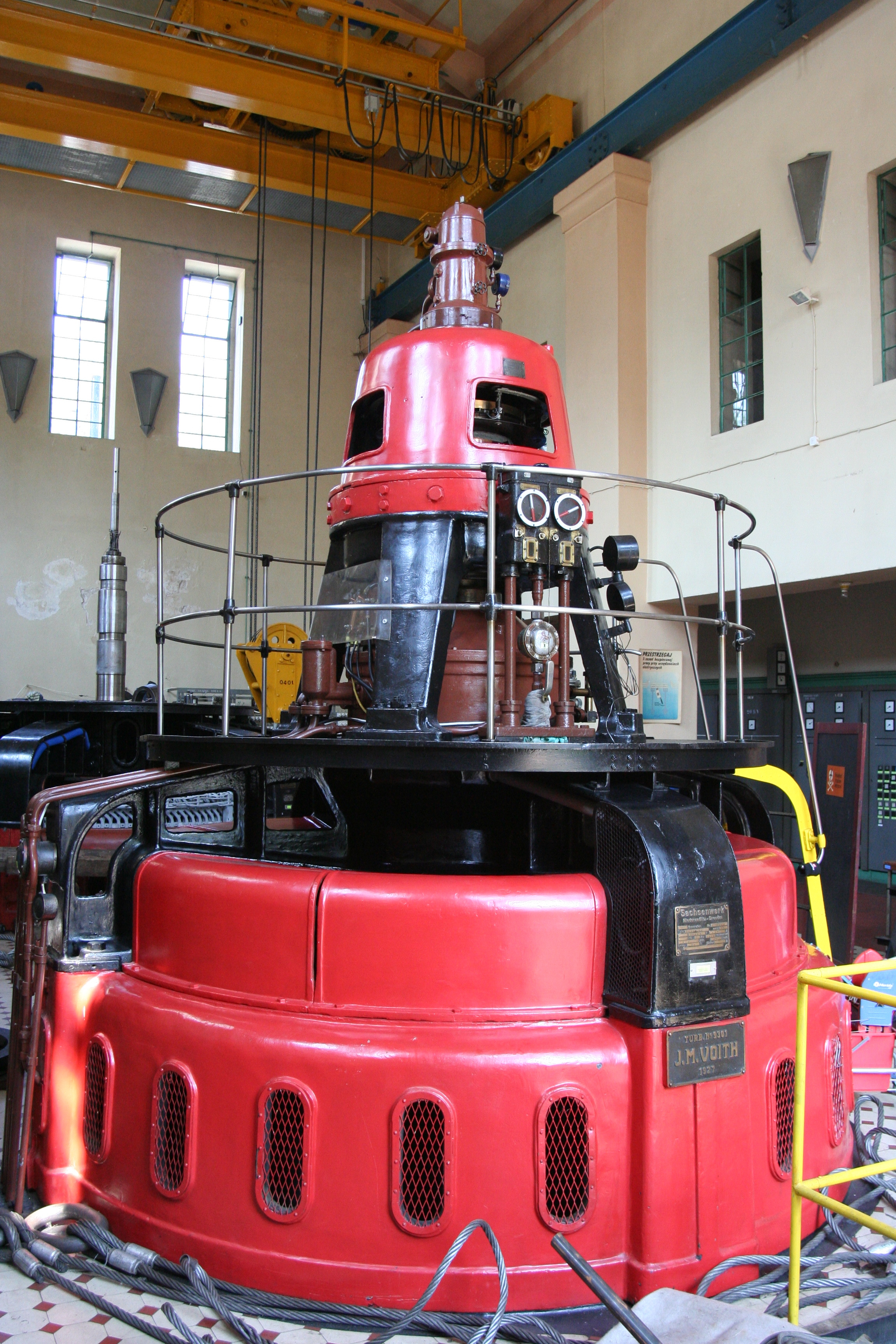 J.M.Voith turbine in Wrzeszczyn power plant on Wrzeszczyn Lake on Bóbr river near Wrzeszczyn, Lower Silesia, Poland.